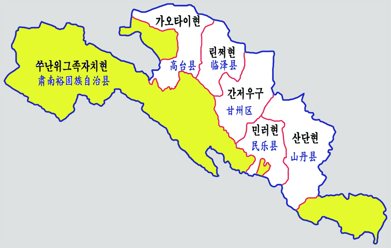 장예시 현급구역도